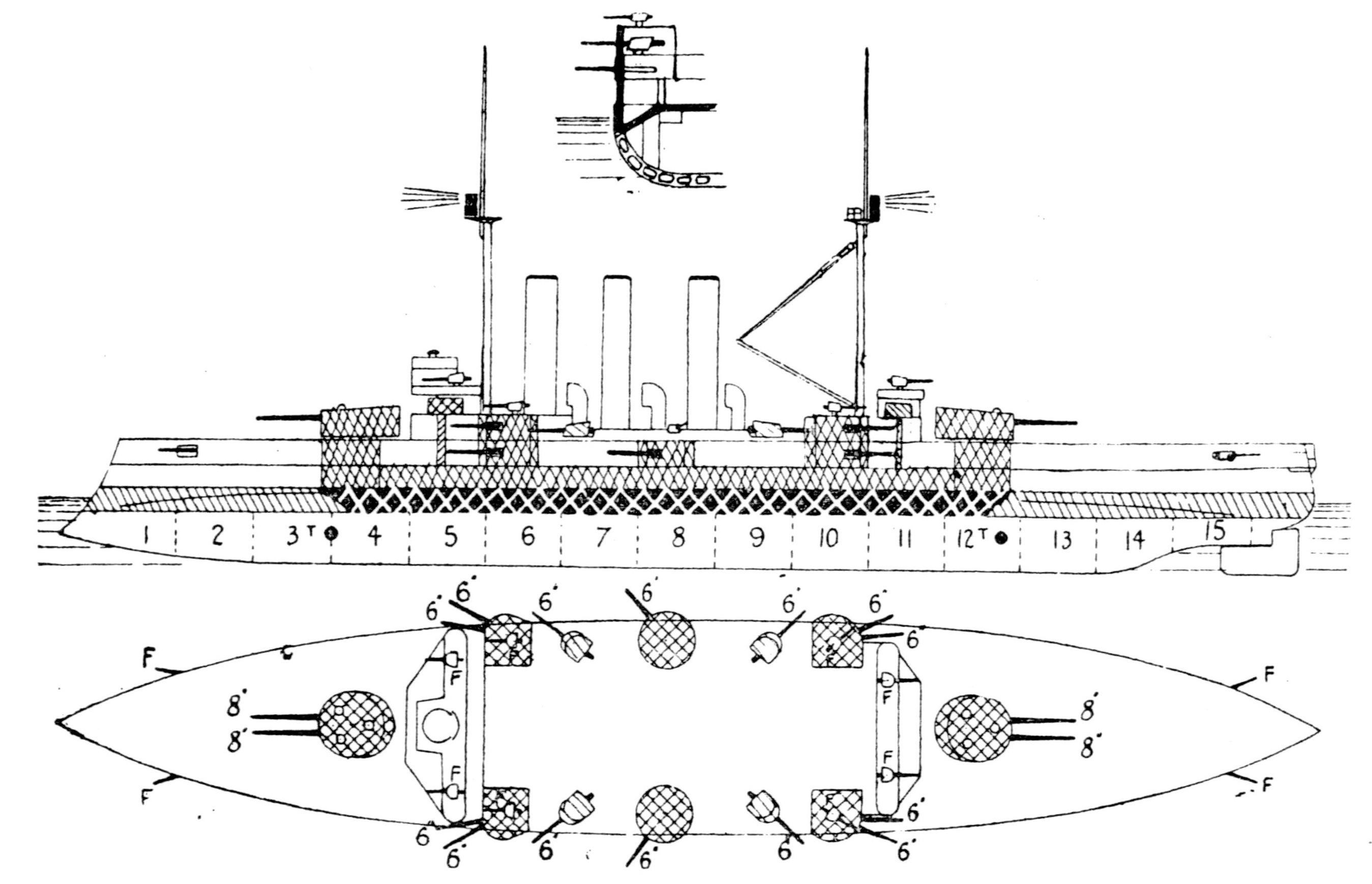 出雲型装甲巡洋艦